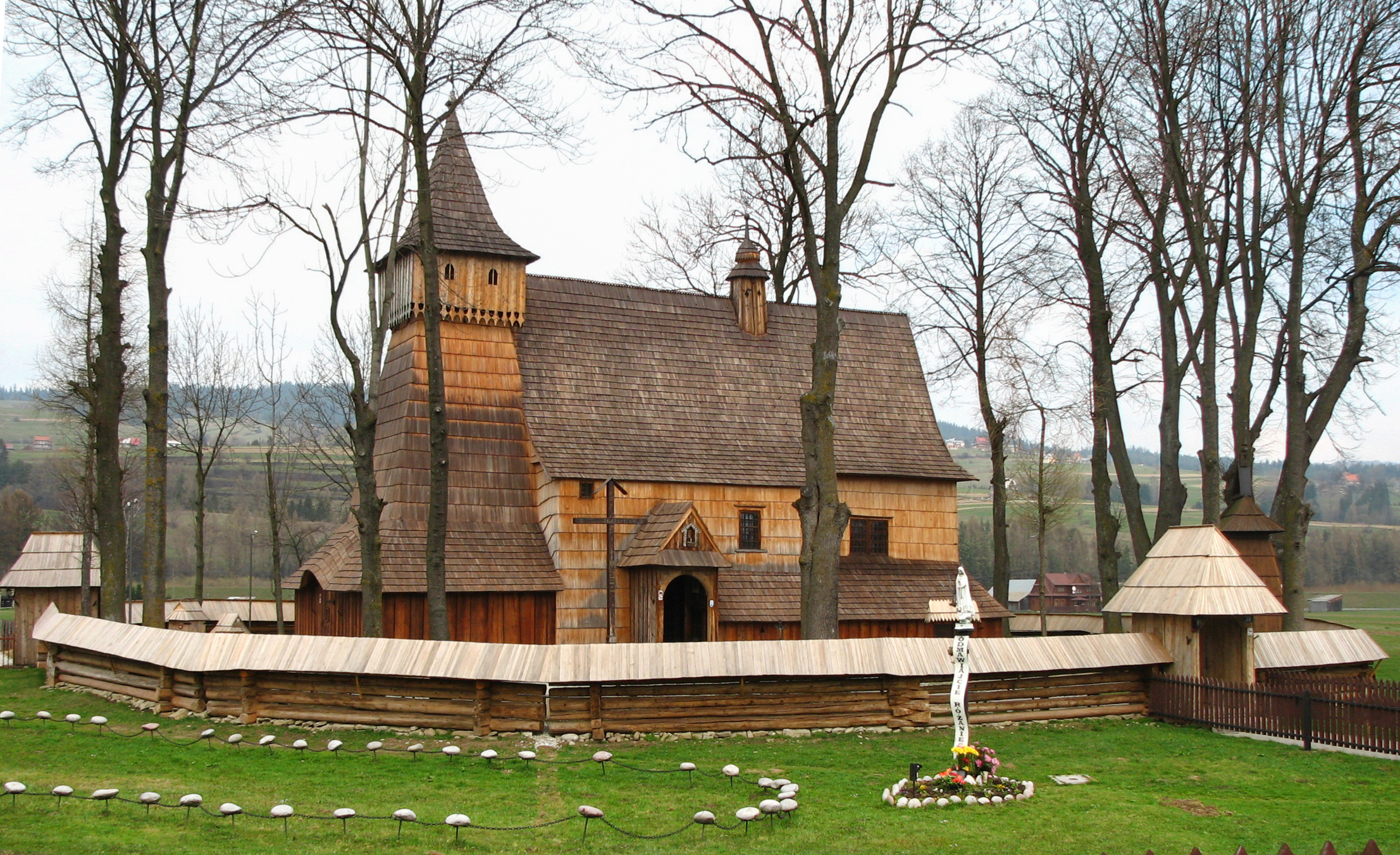 Drewniany kościół gotycki p.w. św. Michała Archanioła. 11.04.2007 Gothic church in Debno Podhalanskie (Poland). 11.04.2007 Kategoria:Drewniane kościoły w Polsce